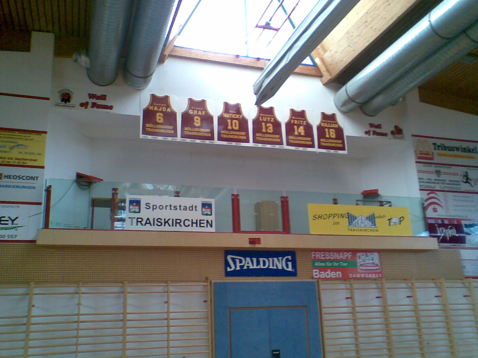 Wall of Fame und Kameraplatz des Lions Dome